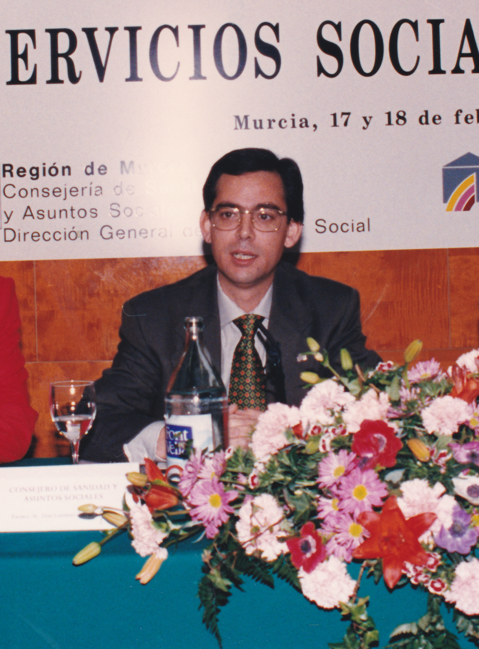 Lorenzo Guirao, Consejero de Sanidad, en las "Jornadas de Centros de Servicios Sociales"